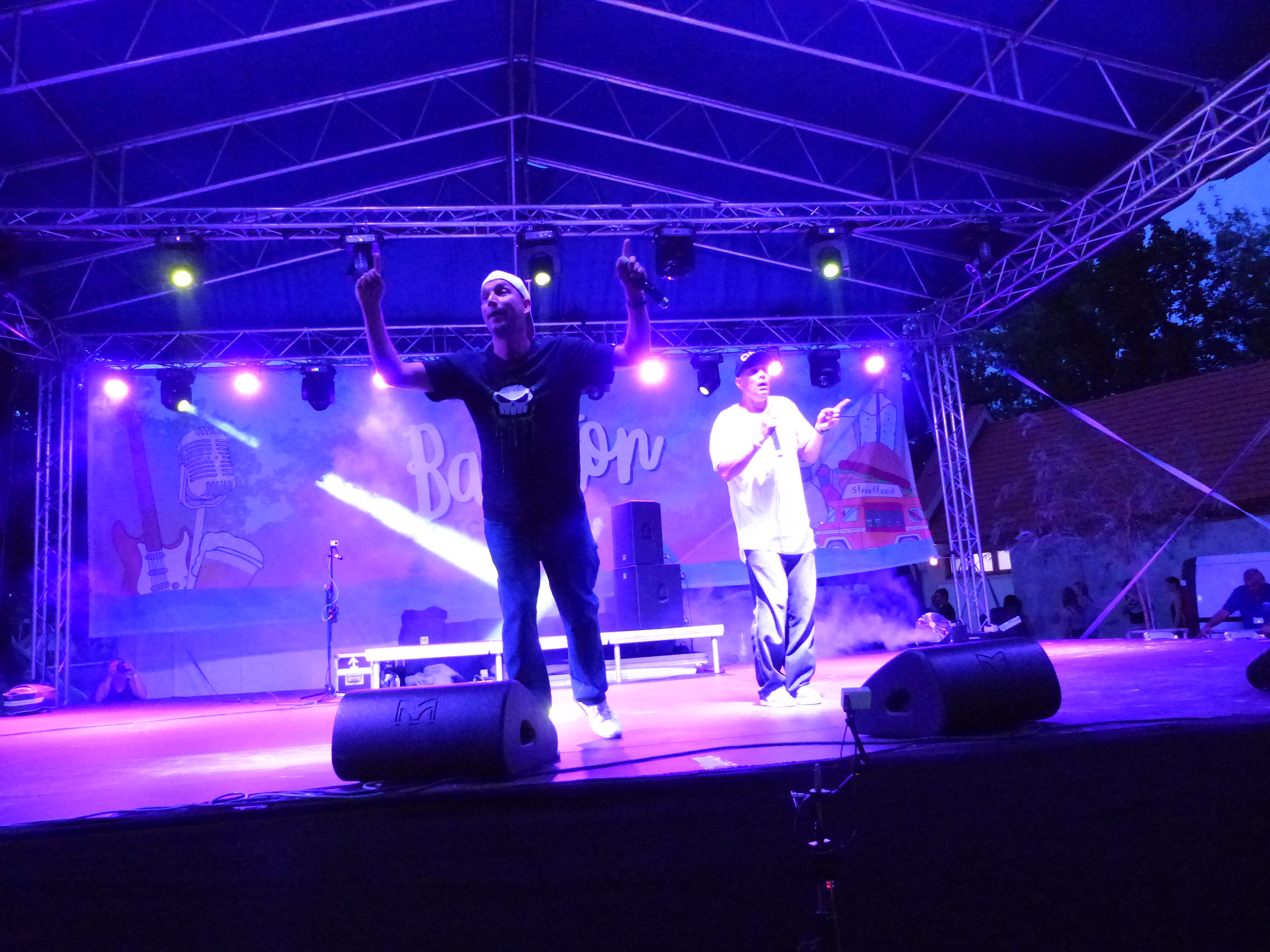 Animal Cannibals - Qka – Koller László, Ricsipí - Dósa Richárd A felvétel 2017. június 29-én, csütörtökön készült Balatonkenesén. Először rendezték meg Balatonkenesén a Balaton fesztivált. A 2017. június 29 -től július 2-ig tartó fesztivál első napján hip-hop együttesek léptek fel - Sub Bass Moster, Animal Cannibals, Akkezdet Phiai. A második napon, 30-a, pénteken indie pop, rock fellépők: Queen's Land, Firkin, Lord, Reckless Roses. A harmadik nap fellépői: Groovehouse, UFO, Kozmix. A negyedik napon a Varnyú Country, a Mokka Tribute, a Republic és a Balkan Fanatik együttesek játszottak.